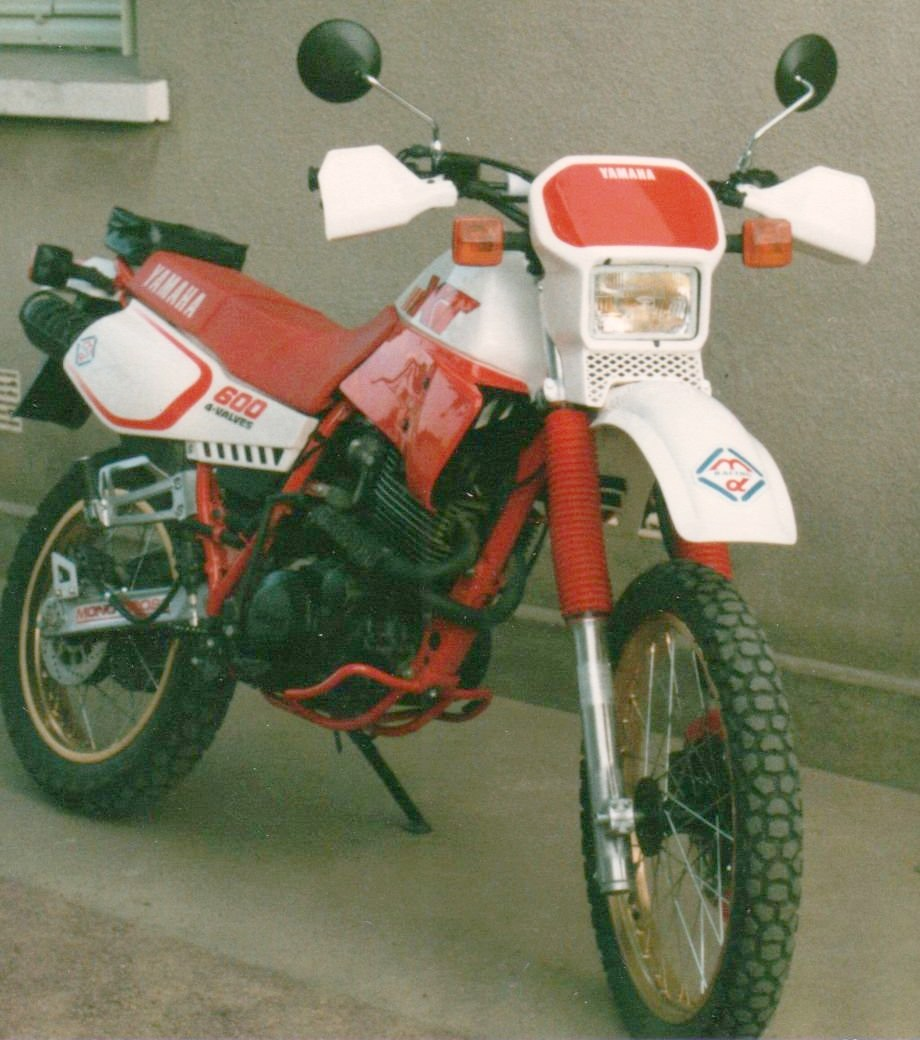 Yamaha XT 600 avec démarrage par kick.